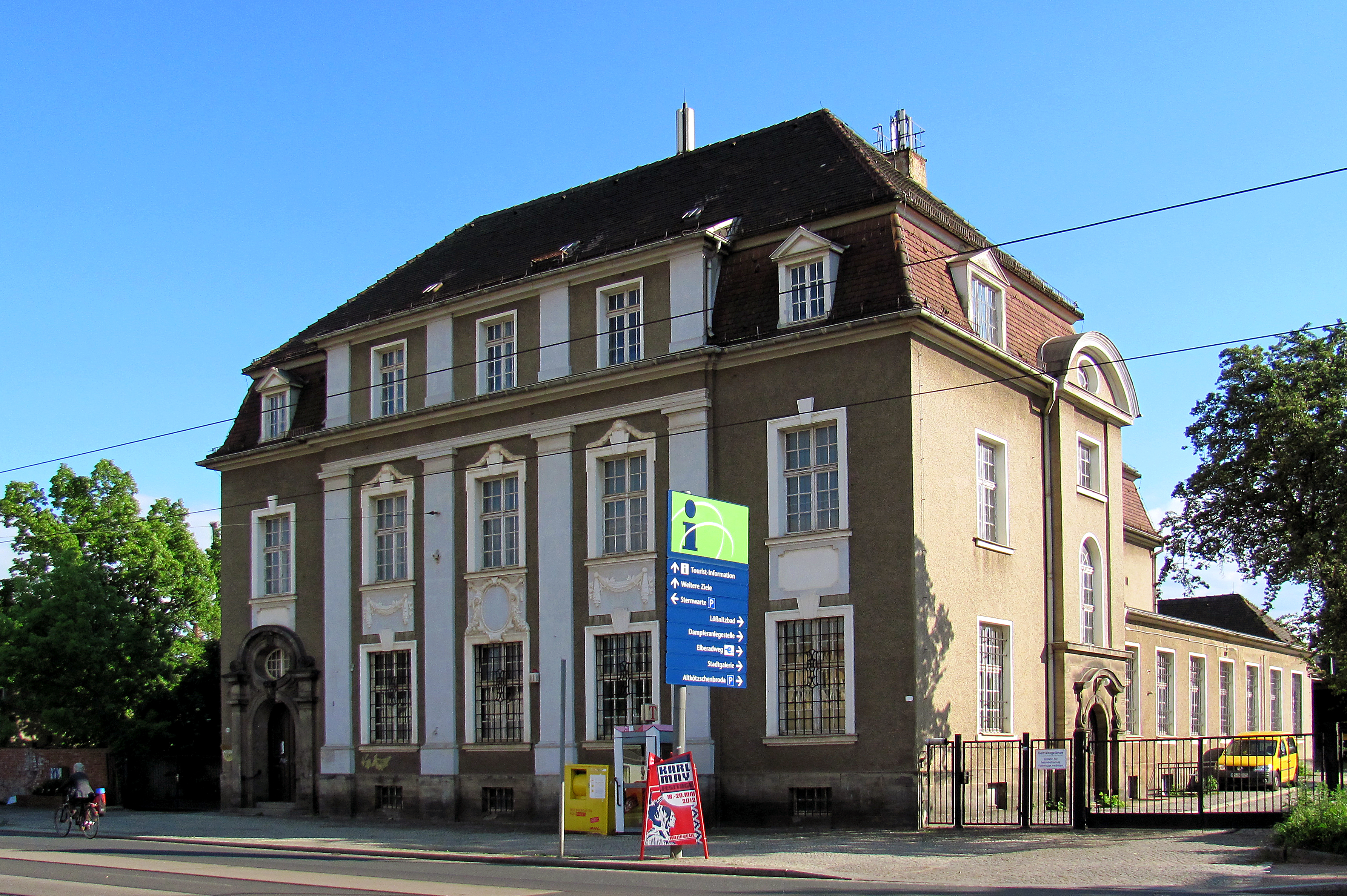 Radebeul, Kötzschenbrodaer Postamt